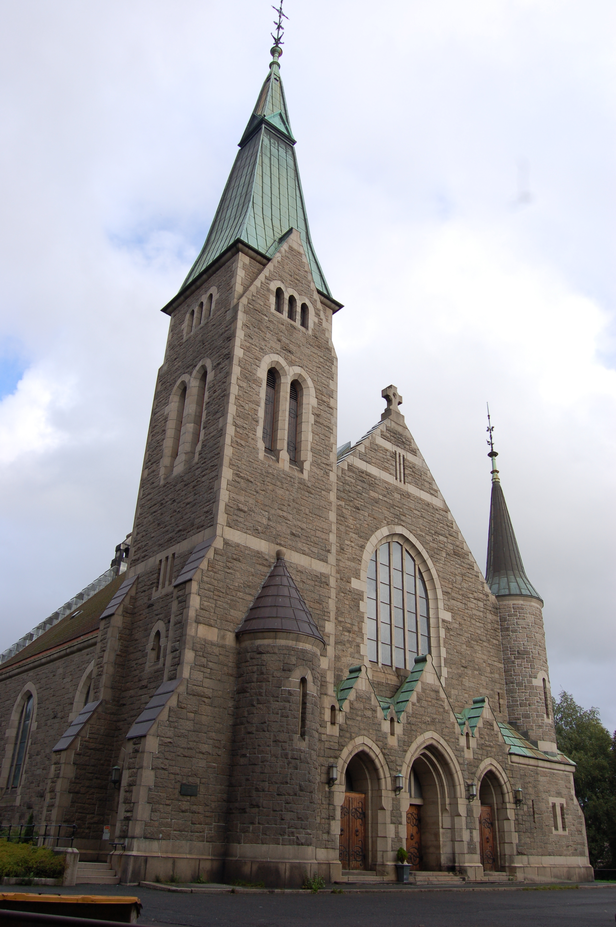 Fagerborg kirke i Oslo, Fagerborg church in Oslo